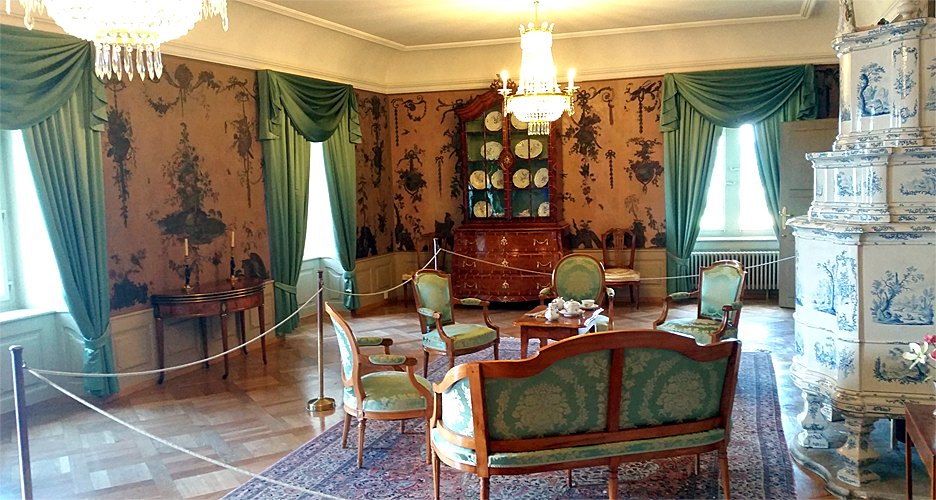 Schloss Lenzburg, Wohnbereich des 19. Jh.